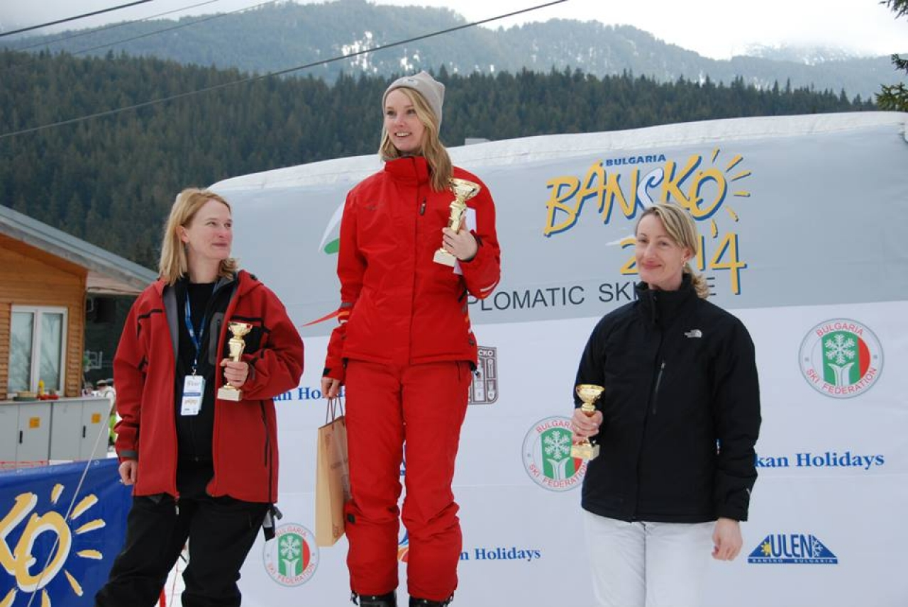 Министър Зинаида Златанова зае трето място в своята категория